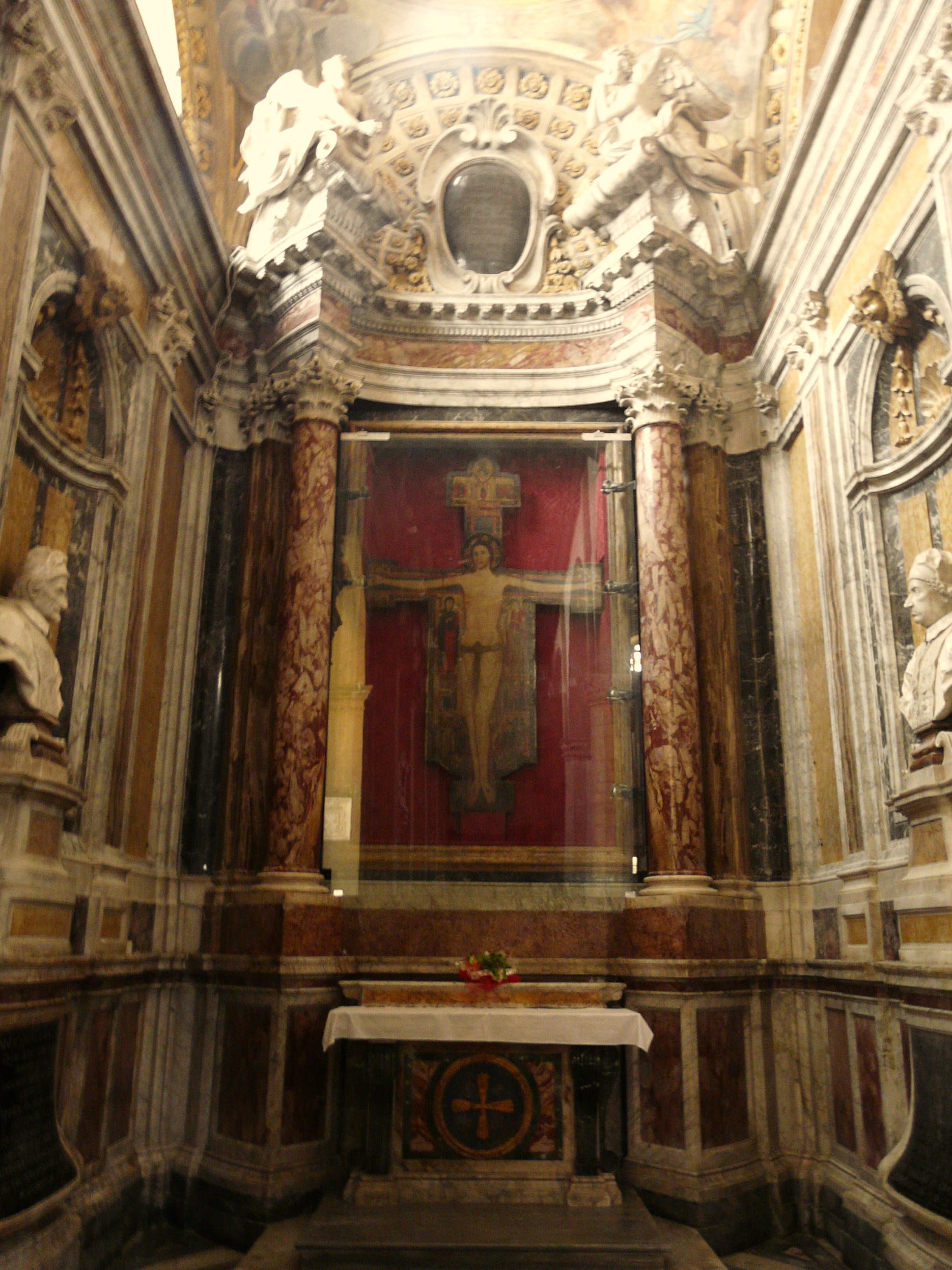 Altare della Cattedrale di Santa Maria Assunta, Sarzana, Liguria, Italia